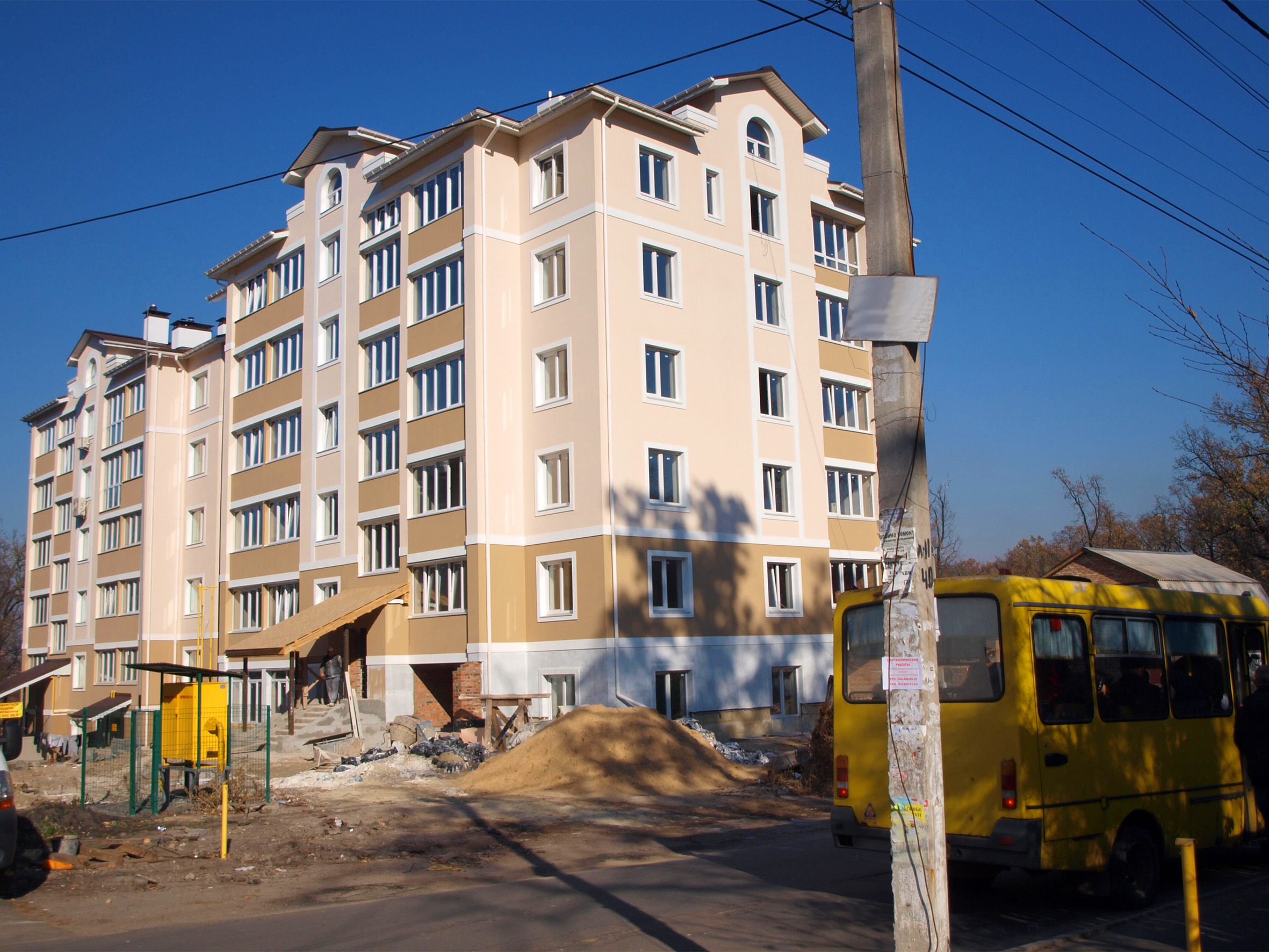 ЖК на вул. Новооскольській, 8-в. Урочище Пилипів Потік. Ірпінь